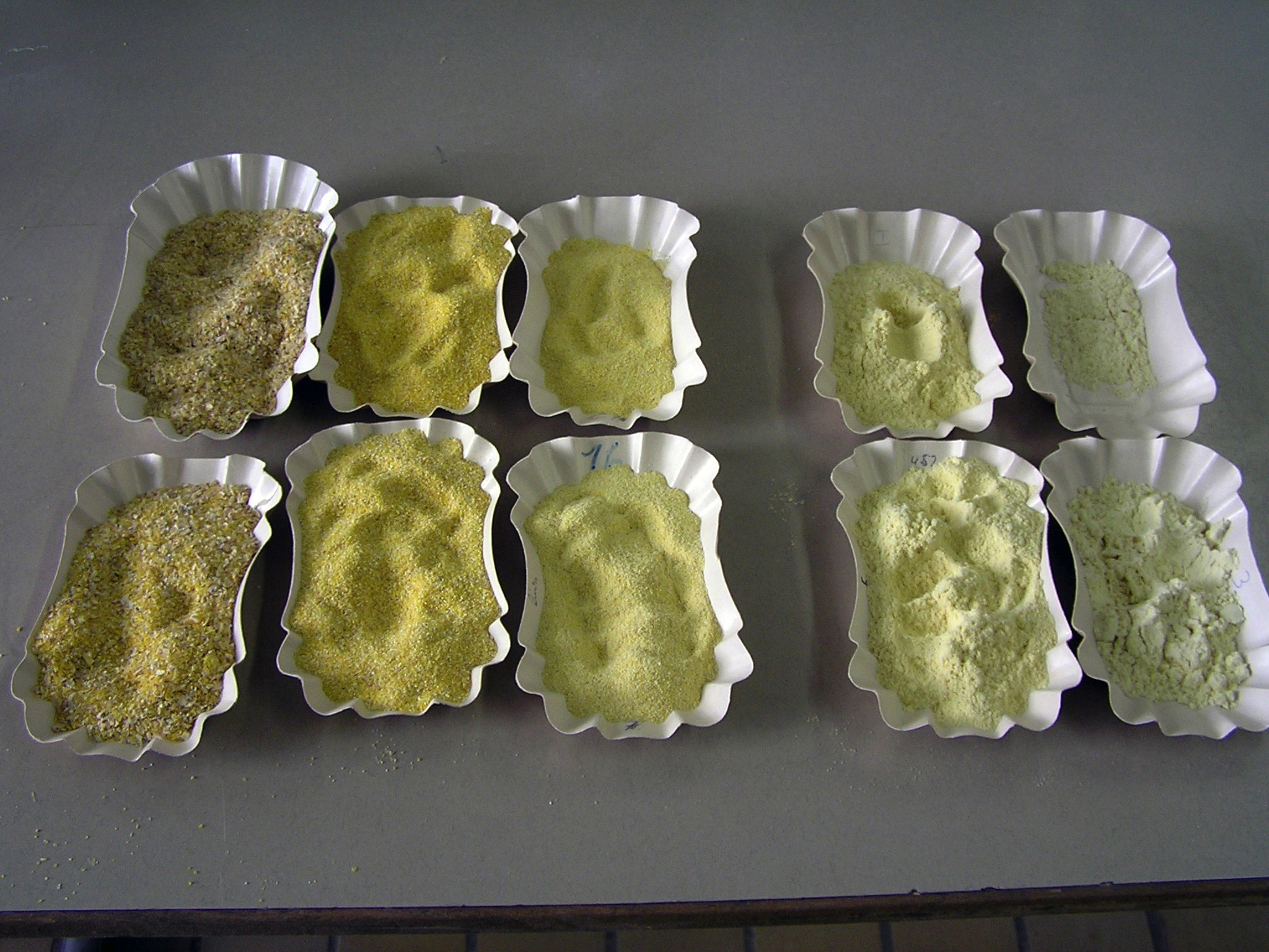 verschiedene Maisprodukte: Maisschrot, Maisgrieß, Maisdunst und Maismehl (von links)